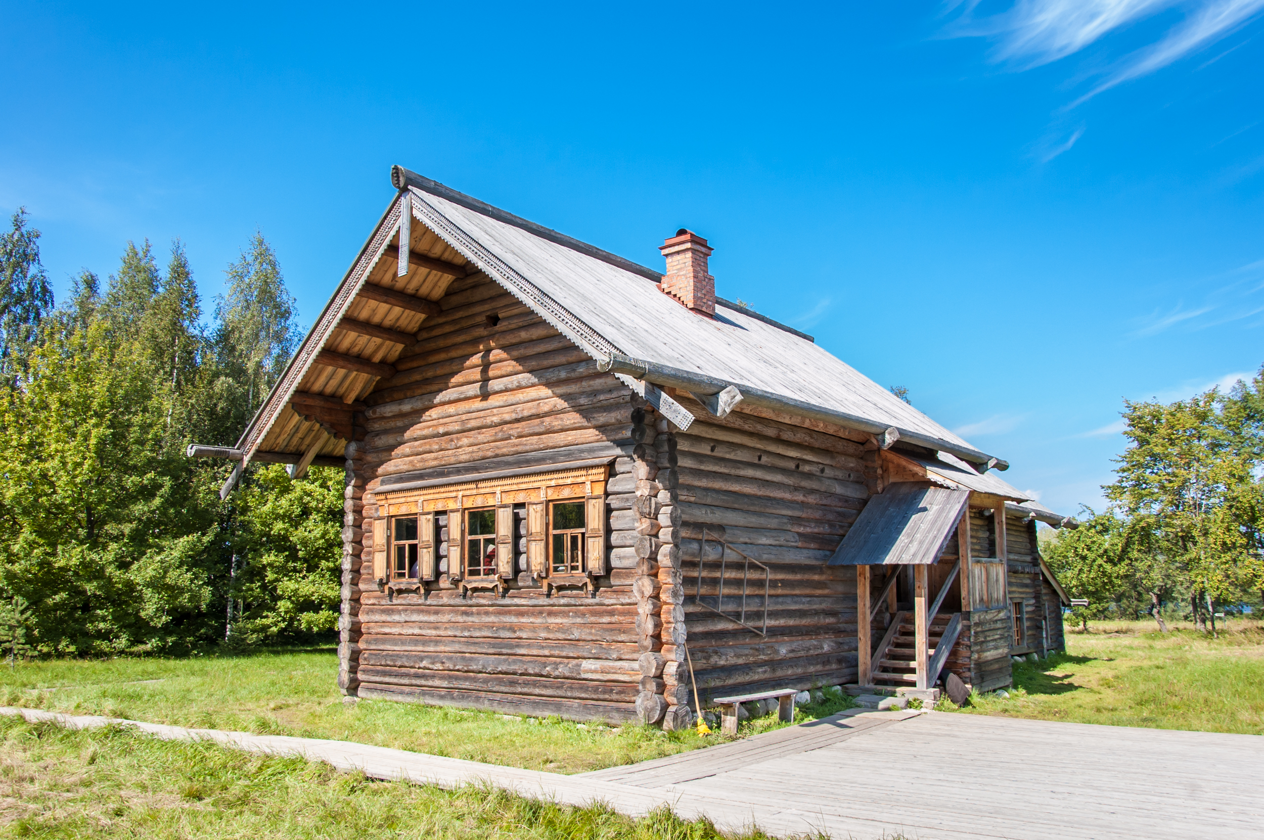 Изба К.А. Утенковой из д. Устье-Кировское Пестовского района: Витославлицы, Великий Новгород, Новгородская область